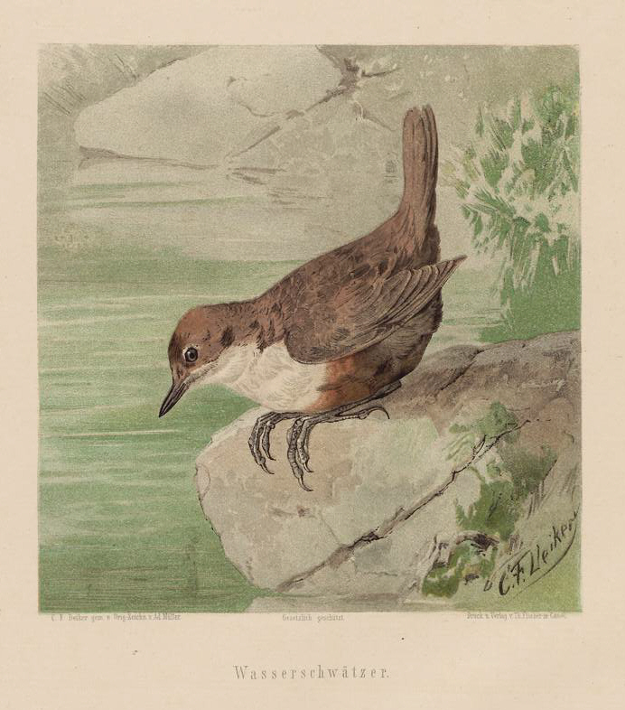 Chromolithographie aus der Serie „Jagdbare Thiere“ von Carl Friedrich Deiker Wasserschwätzer. n. Orig.-Zeichn. v. Ad. Müller.